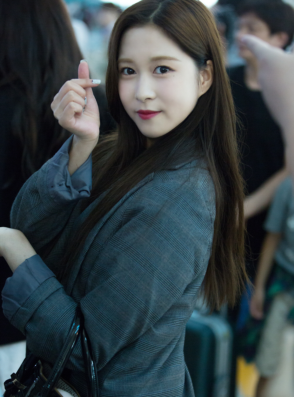 170921 인천공항 출국 우주소녀 다영 직찍